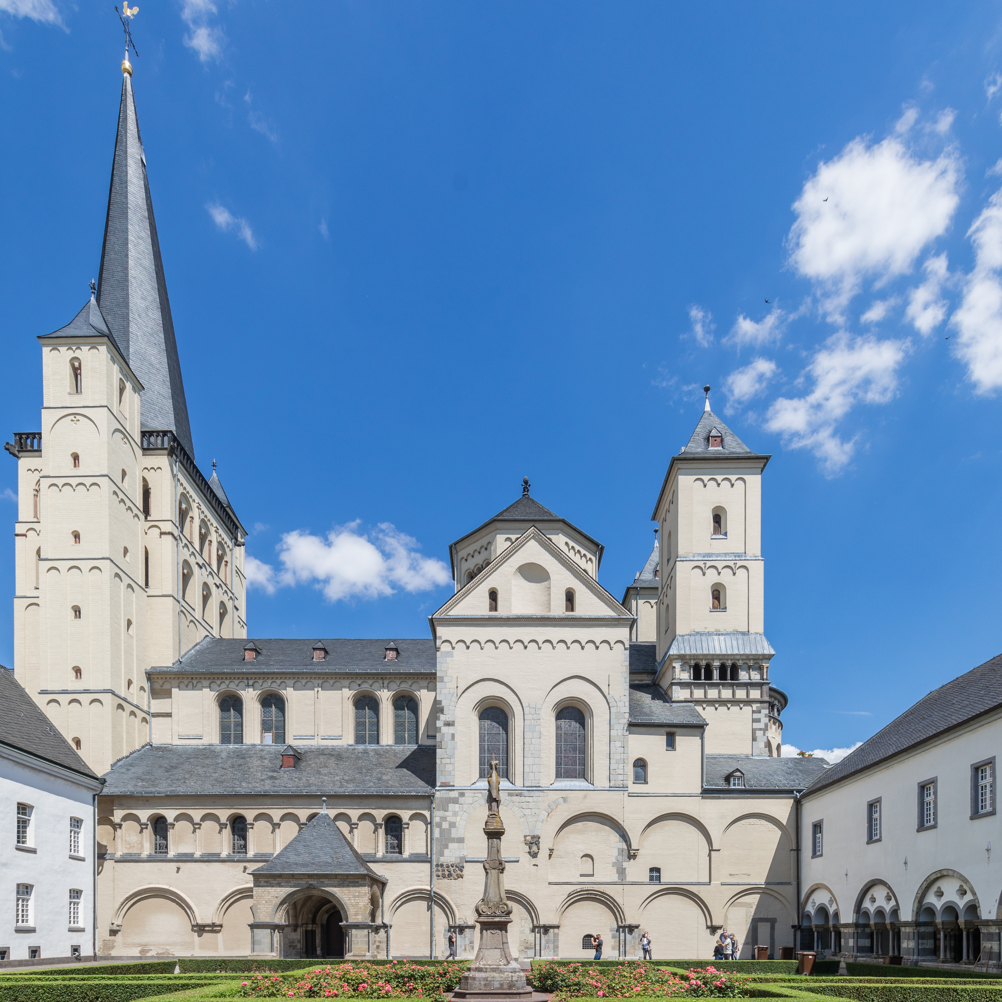 Abteikirche St. Nikolaus der Abtei Brauweiler. im Vordergrund die Mariensäule im Marienhof